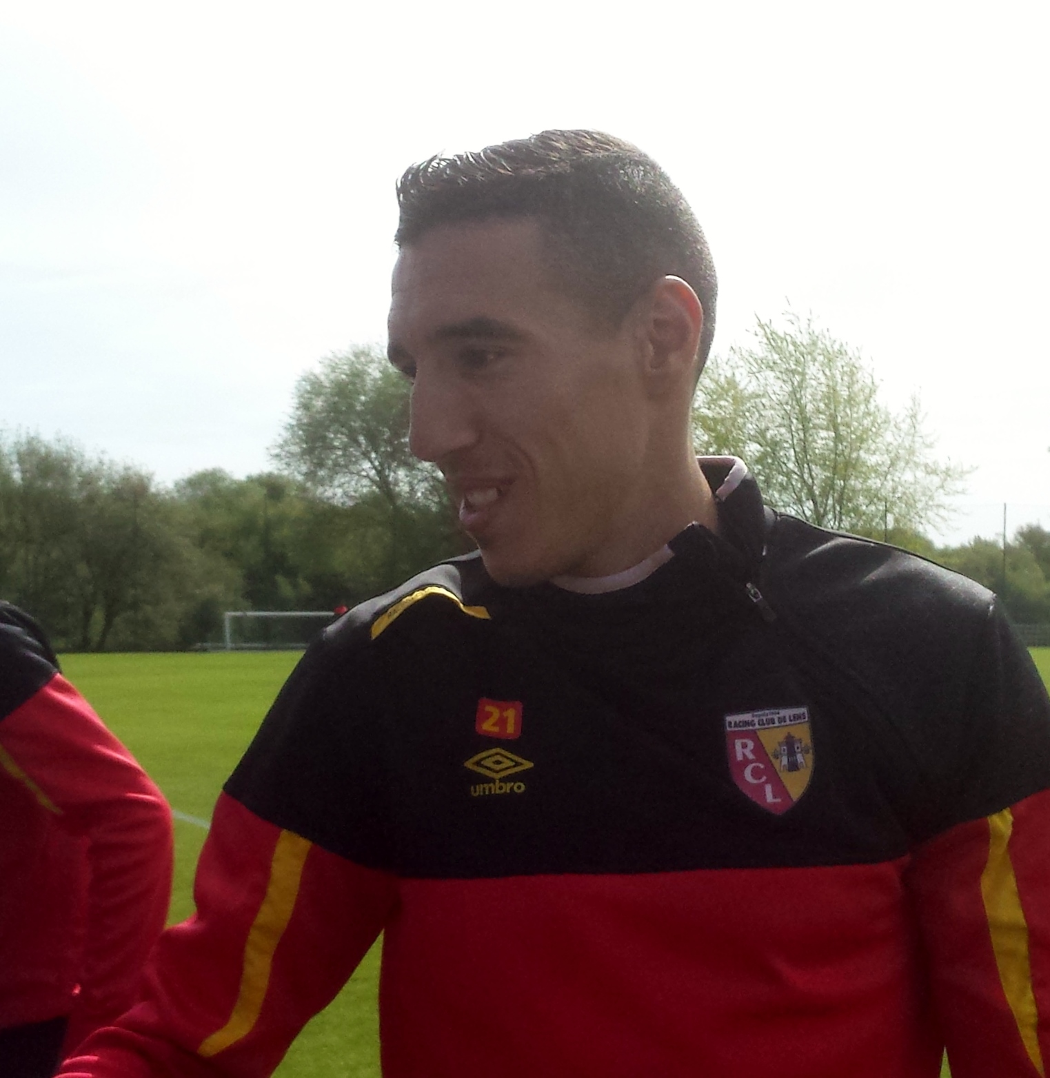 Alharbi El Jadeyaoui lors d'un entraînement public du Racing Club de Lens, le 8 mai 2015, sur le terrain San Siro du Centre technique et sportif de La Gaillette.